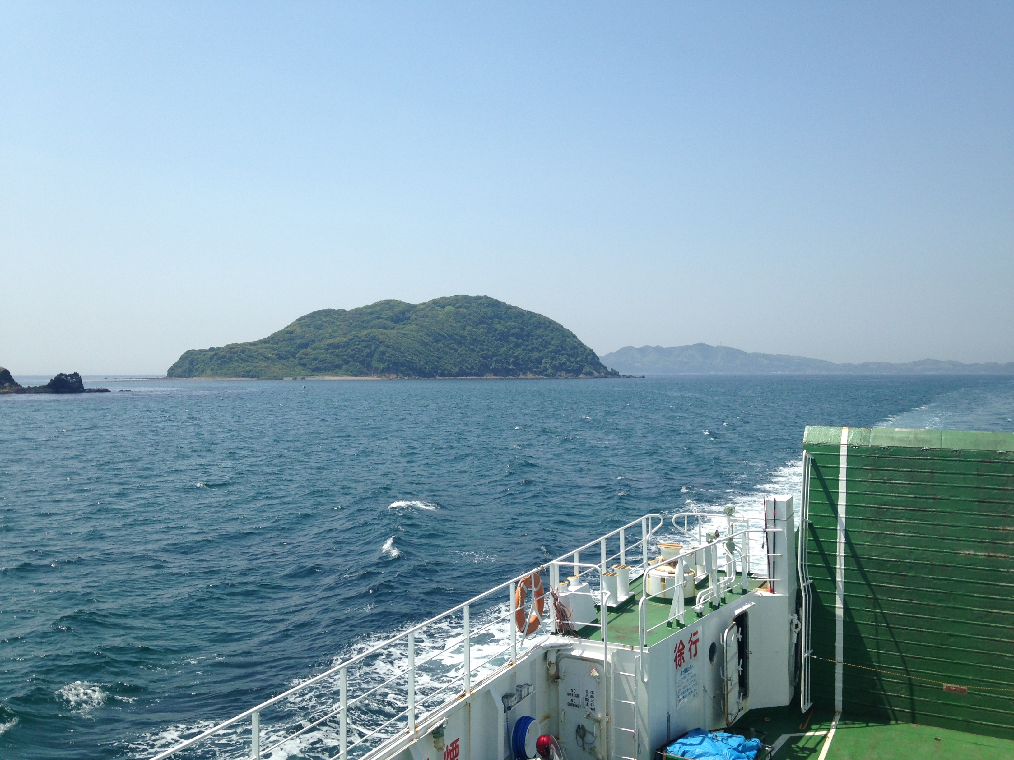 神湊行きの「フェリーおおしま」より望む勝島(手前)と筑前大島(奥)